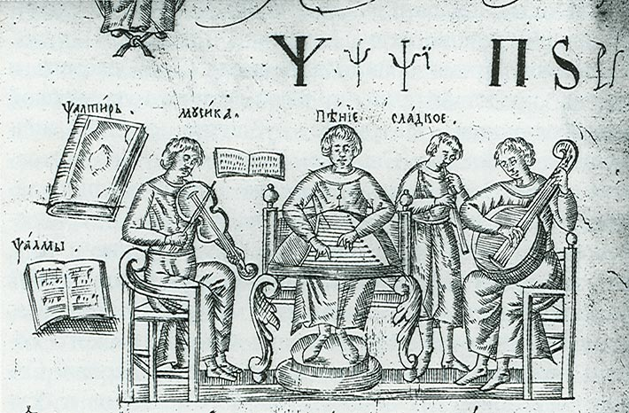 Русский инструментальный квартет XVII в. «Букварь» Кариона Истомина, — Москва. 1696: л. 1 об.; буква "Пси" (псалтырь, псалмы) // Лихачев Д. С. Великая Русь: История и художественная культура 10-17 века. — М., 1994.